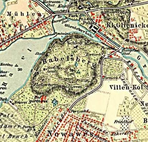 Karte Umgebung von Potsdam, um 1900, Maßstab 1:42.000 (Ausschnitt) Erläuterung zu Nowawes am unteren Bildrand: Nowawes und Neubabelsberg wurden 1938 zur Stadt Babelsberg zusammengeschlossen, die wiederum 1939 mit Potsdam vereinigt wurde.